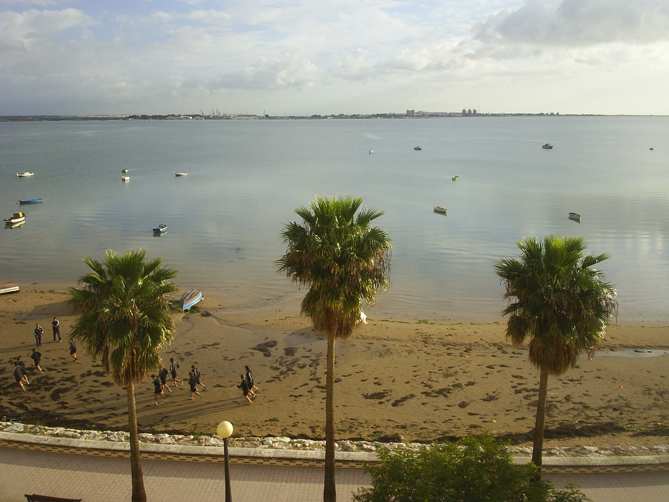 Playa de la Cachucha en Puerto Real (Cadiz). Al fondo, San Fernando